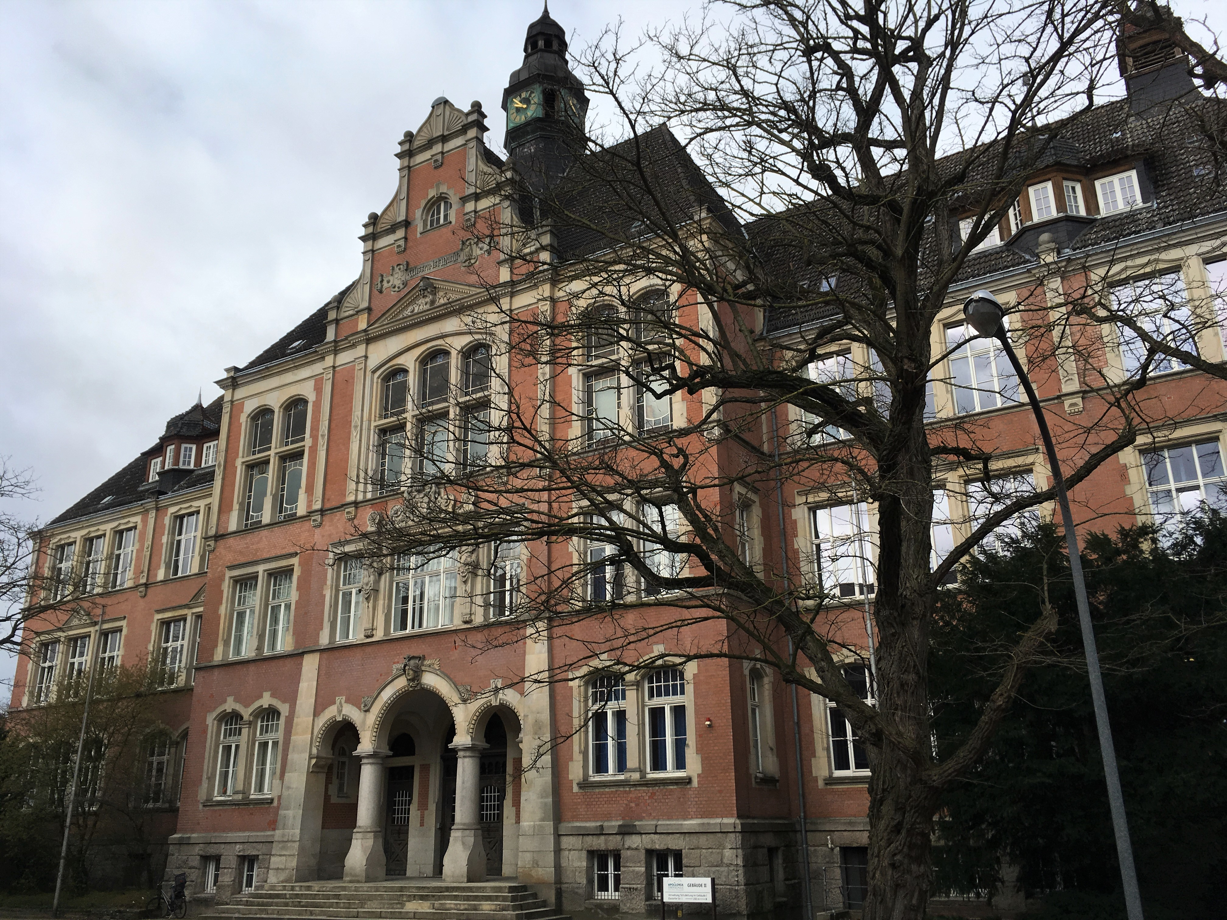 Oberschule Uelzen